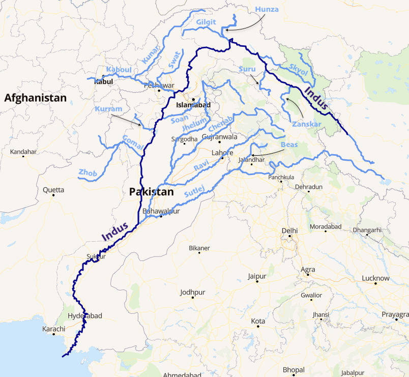 carte réalisée sur umap This map may be incomplete, and may contain errors. Don't rely solely on it for navigation.